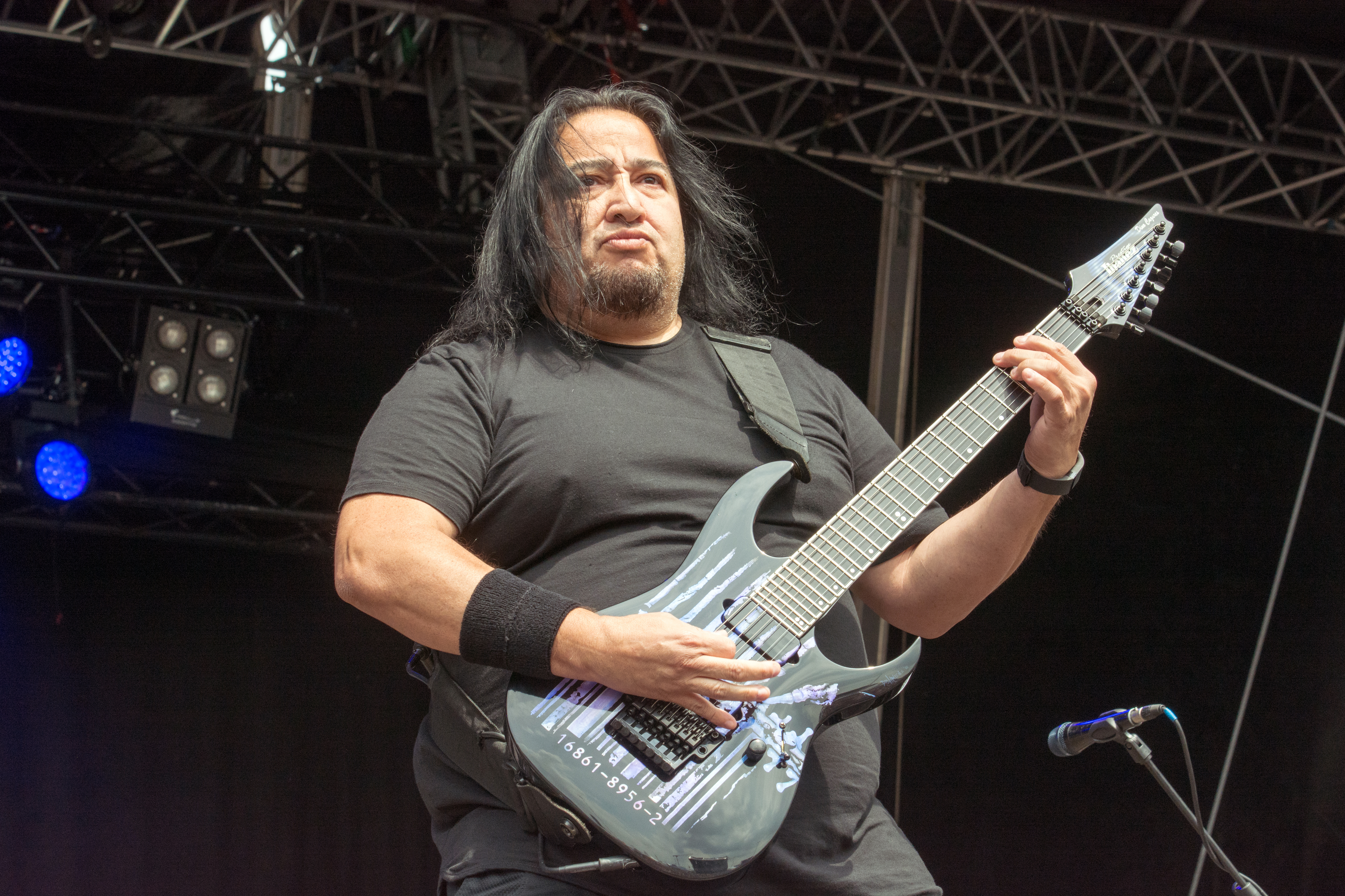 Fear Factory auf dem Elbriot 2016